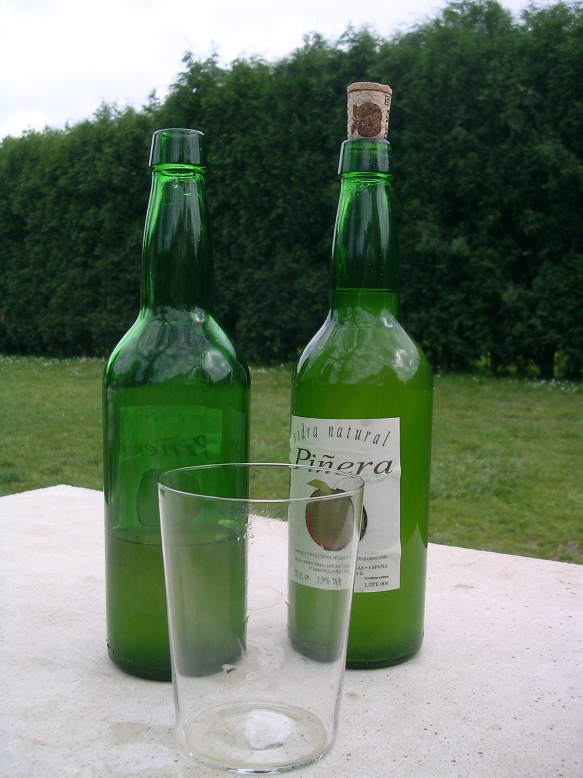 Sidra Natural de Asturias, en este caso del llagar Piñera.